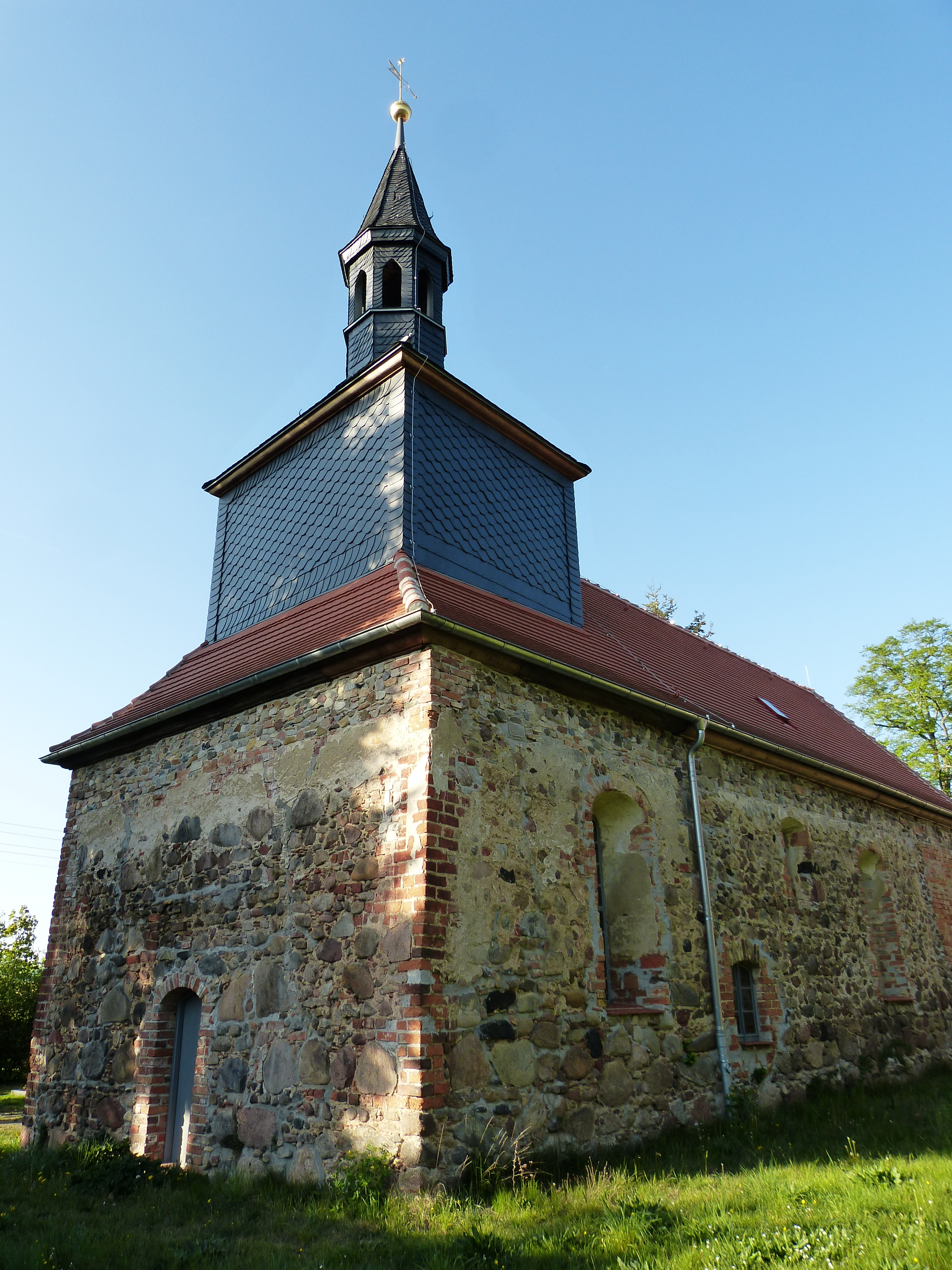 Hohenlubast (Ortsteil von Schköna), Feldsteinkirche aus dem 13. Jh. , Sicht auf den Kirchturm von der hinteren Friedhofsmauer